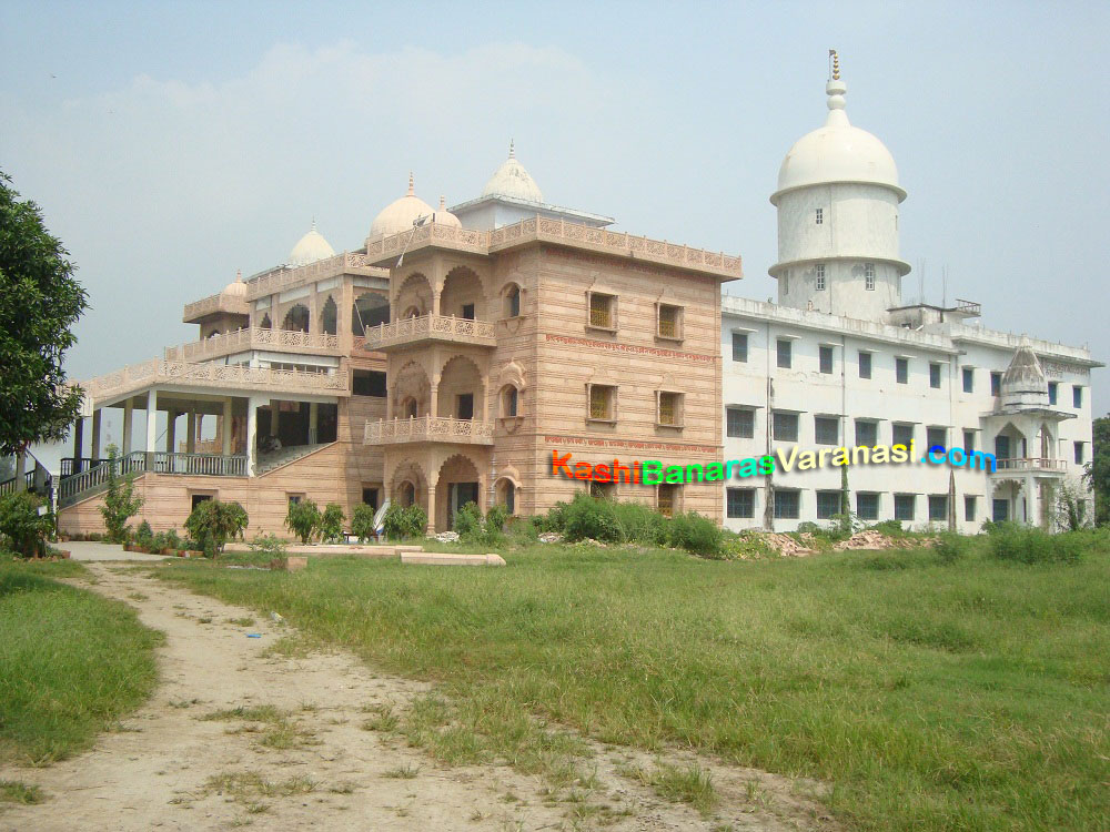 kabir saheb ka janm sthal